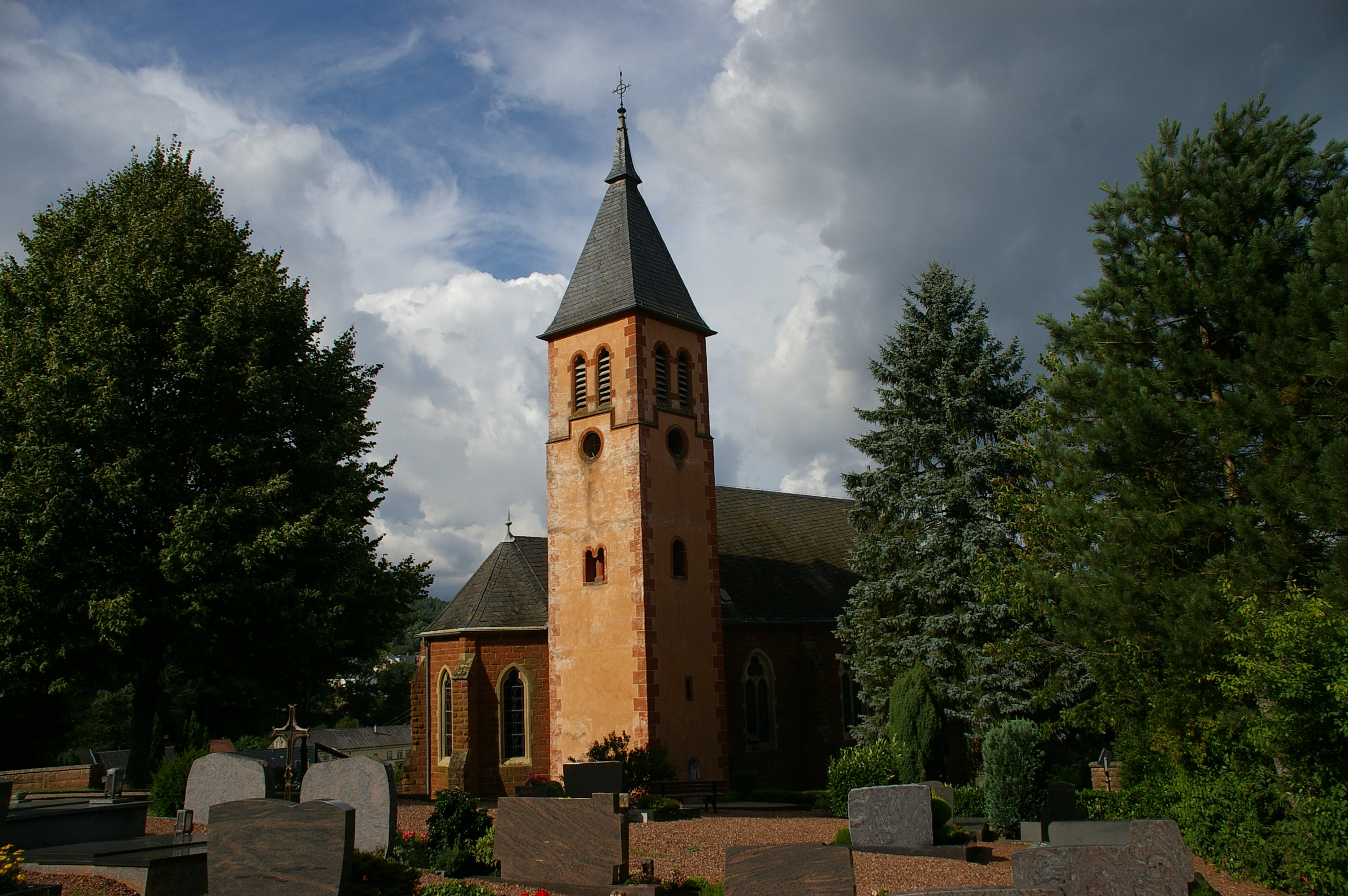 Kirche Trassem